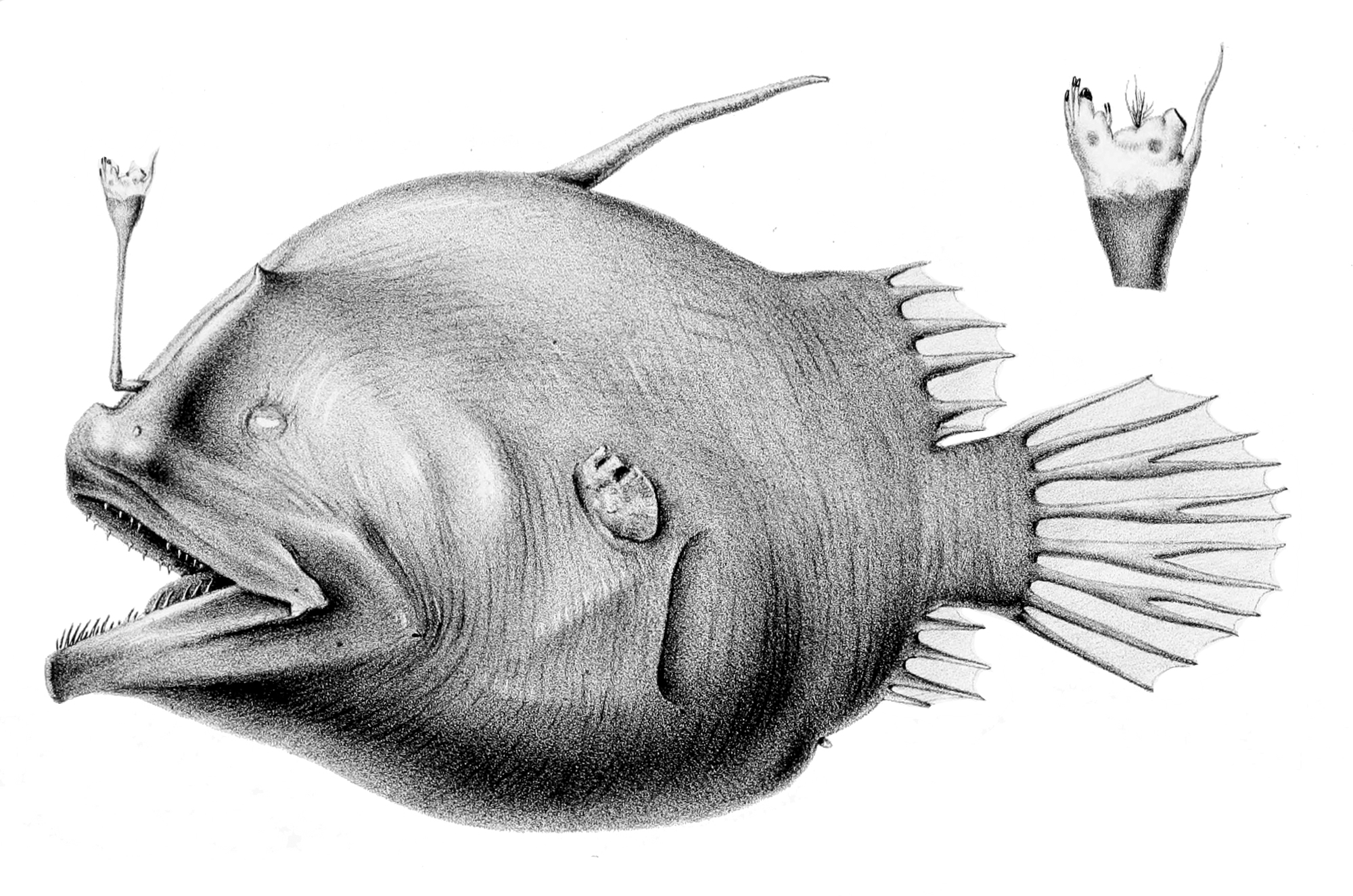 Oneirodes eschrichtii female